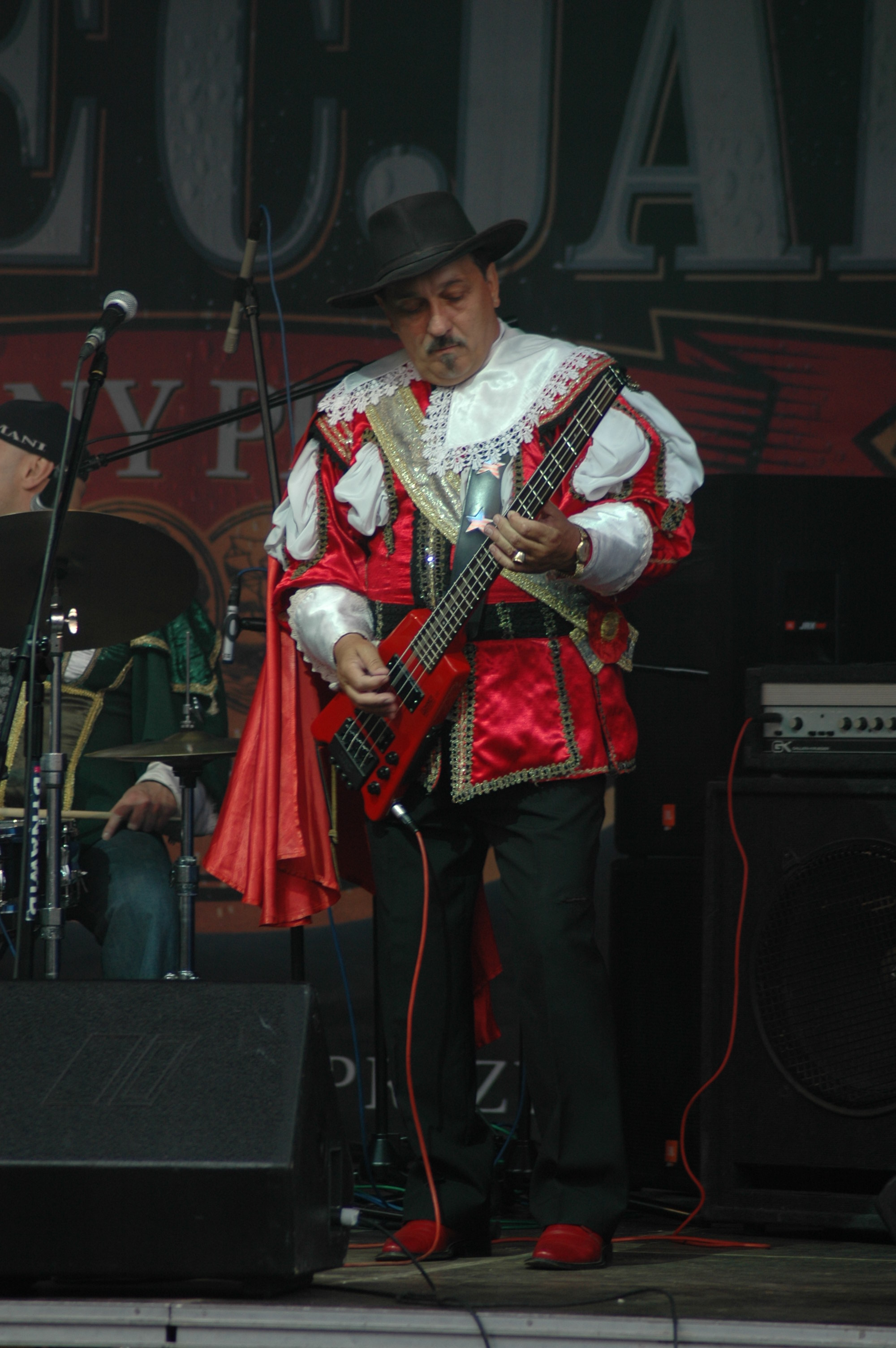 Sławomir Kowalewski - member of Trubadurzy. Polish "big beat" band.